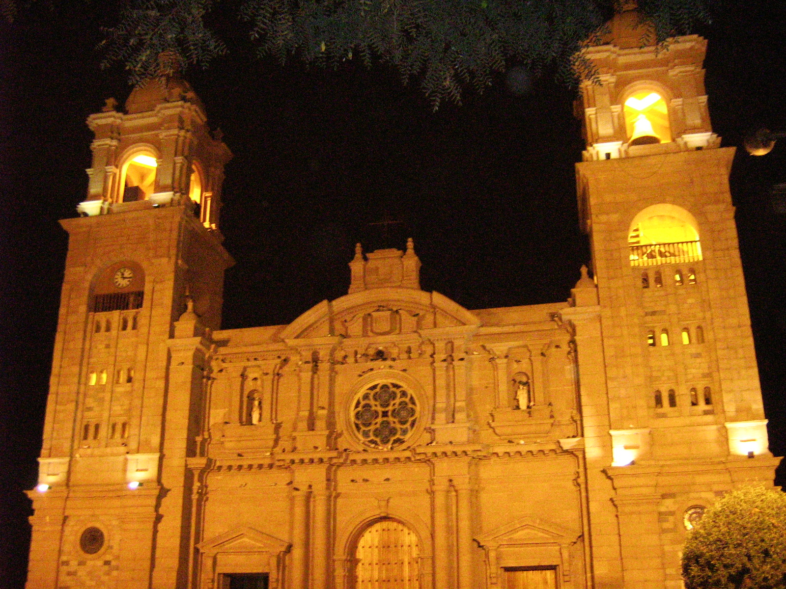 catedral de noche